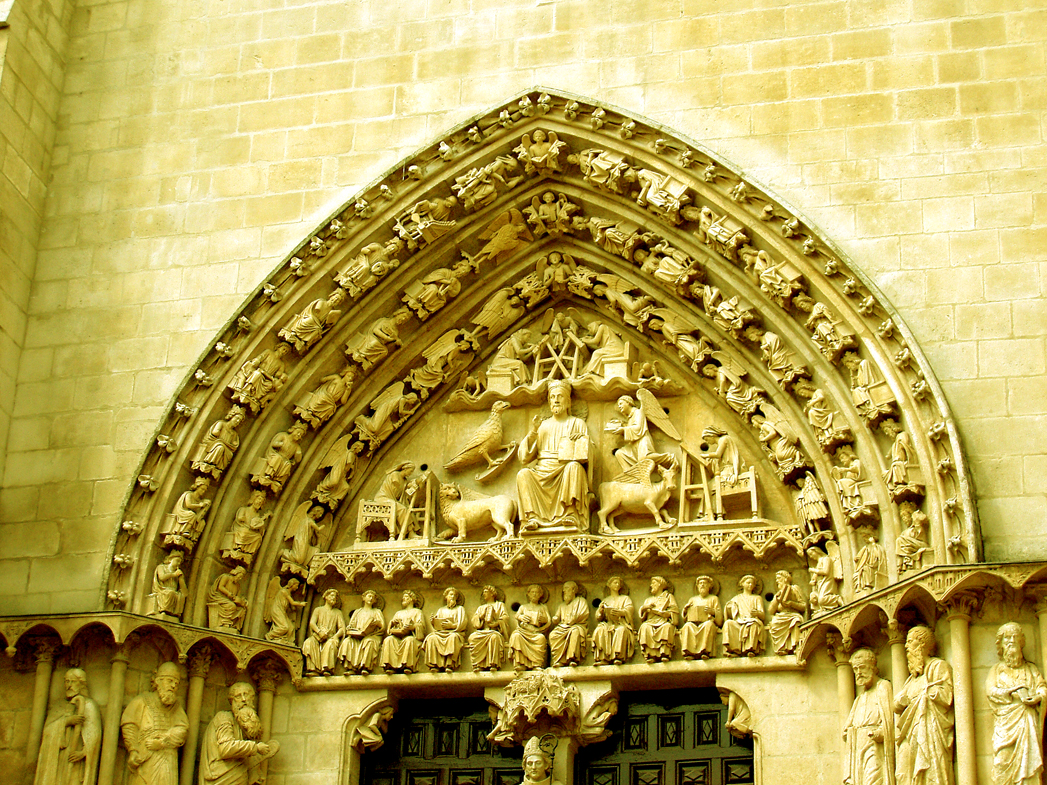 Pórtico del Sarmental Catedral de Burgos, España, siglo XIII